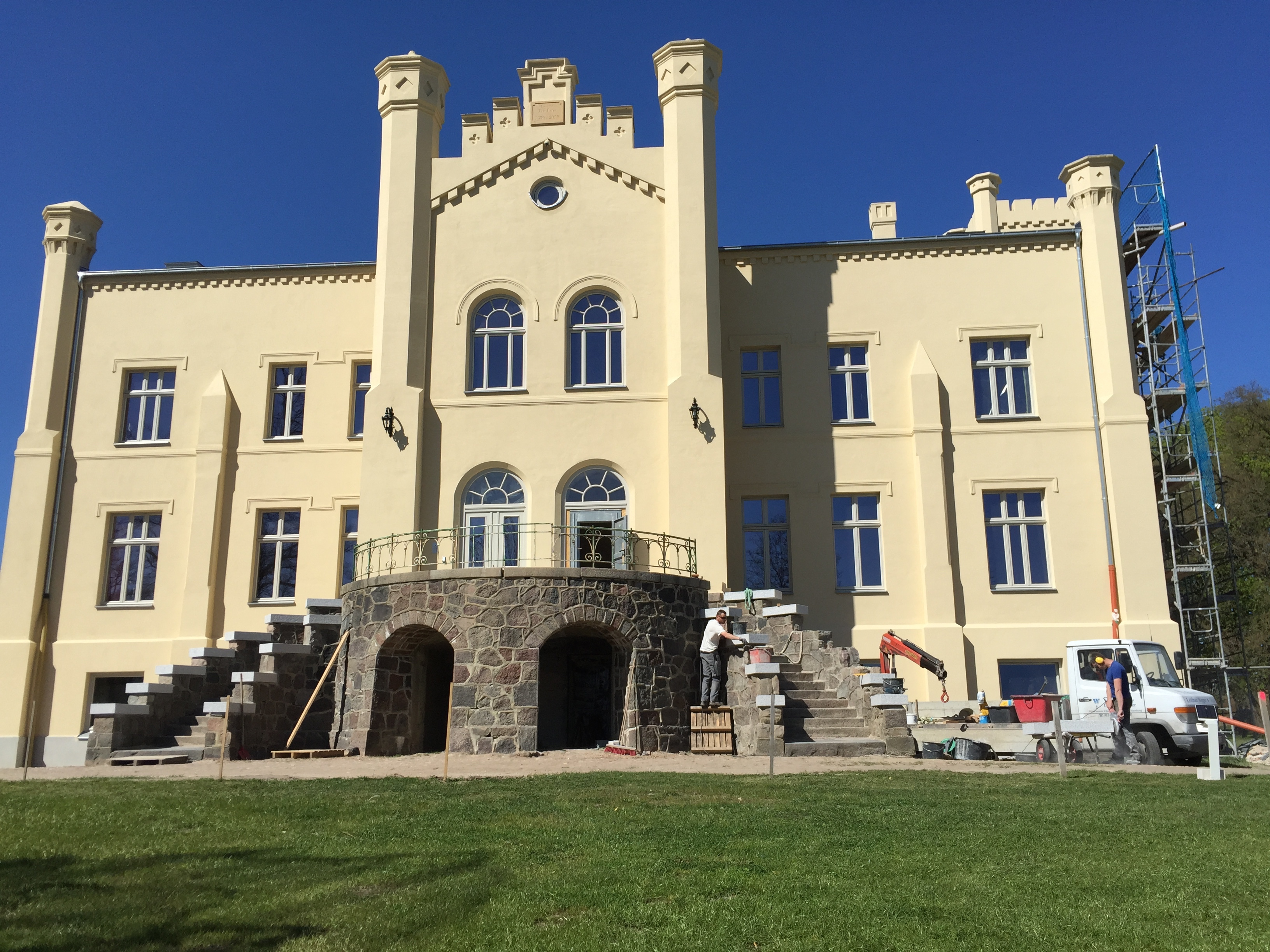 Vorderseite des Guts Goldenitz